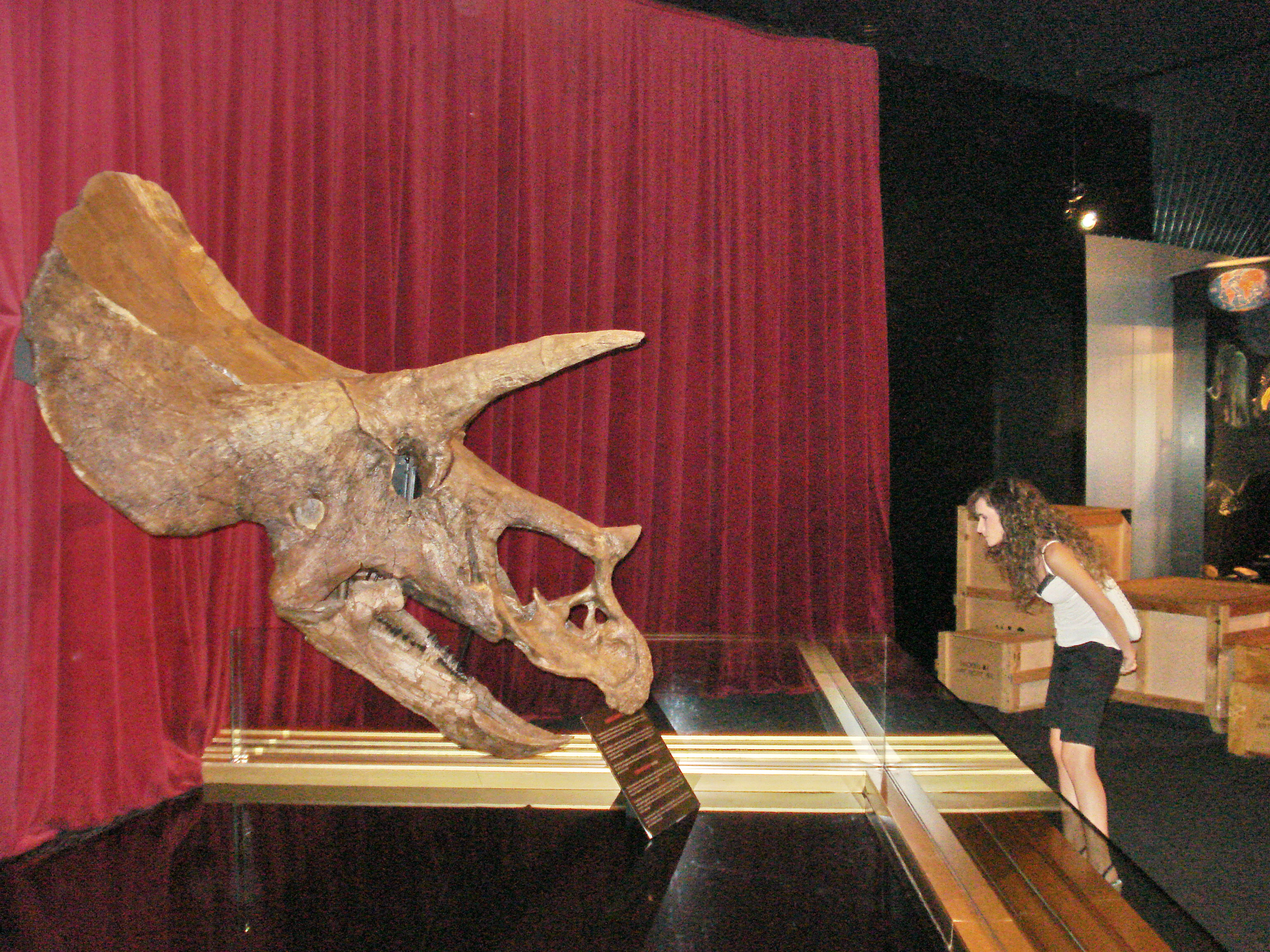 Triceratops. Cabeza expuesta en el museo Cosmo Caixa de Madrid en la colección permantente del mismo".